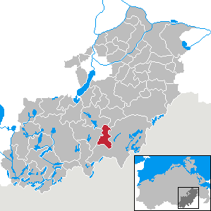 Grünow in Mecklenburg-Vorpommern, Landkreis Mecklenburg-Strelitz